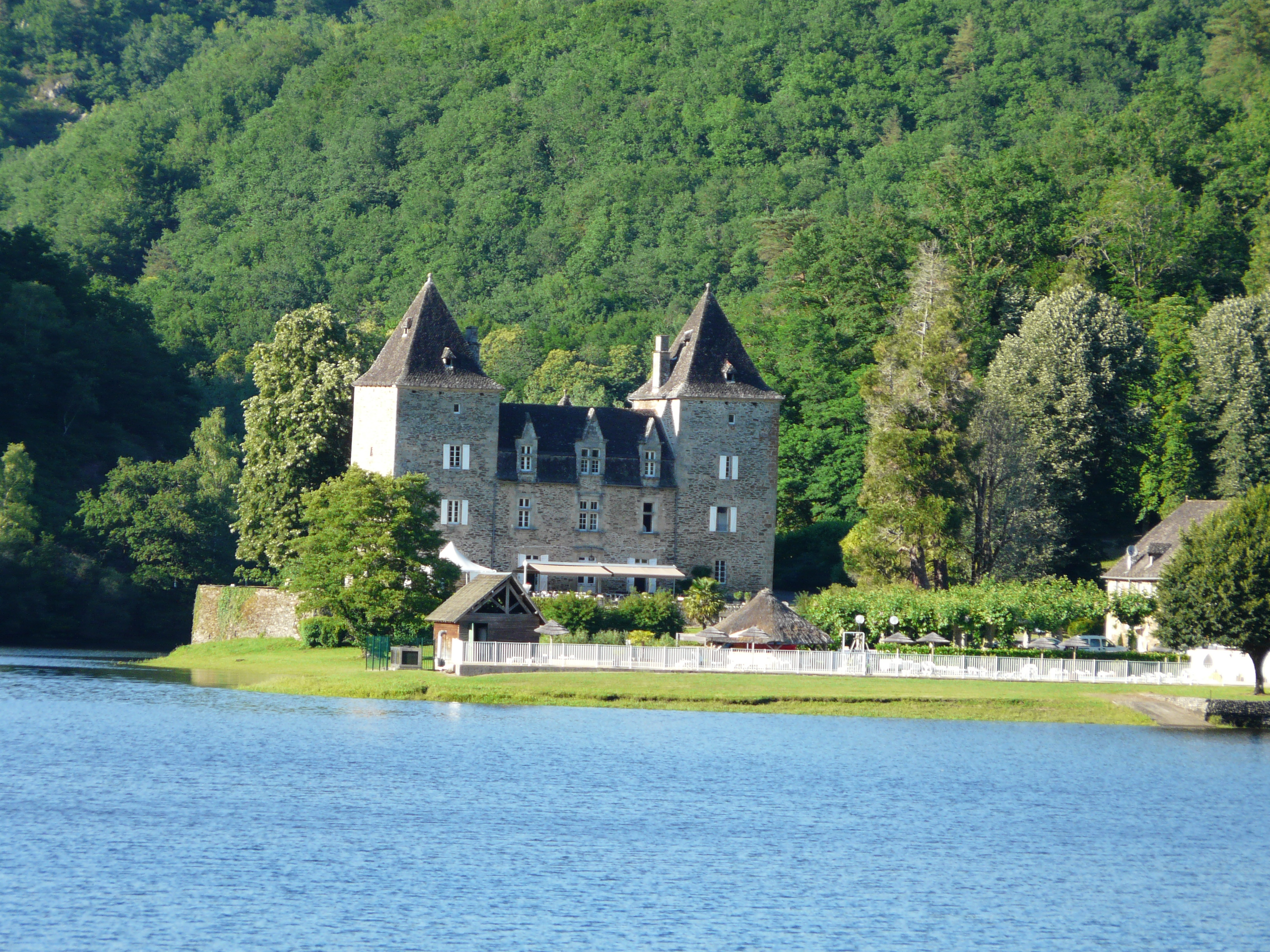 Le château du Gibanel, Saint-Martial-Entraygues, Corrèze, France. Su la gauche, le Doustre qui conflue avec la Dordogne (au premier pan).